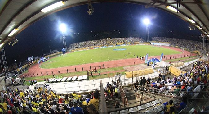 Panorámica del Estadio José Alberto Pérez de Valera, Estado Trujillo, Venezuela, durante un partido de fútbol.